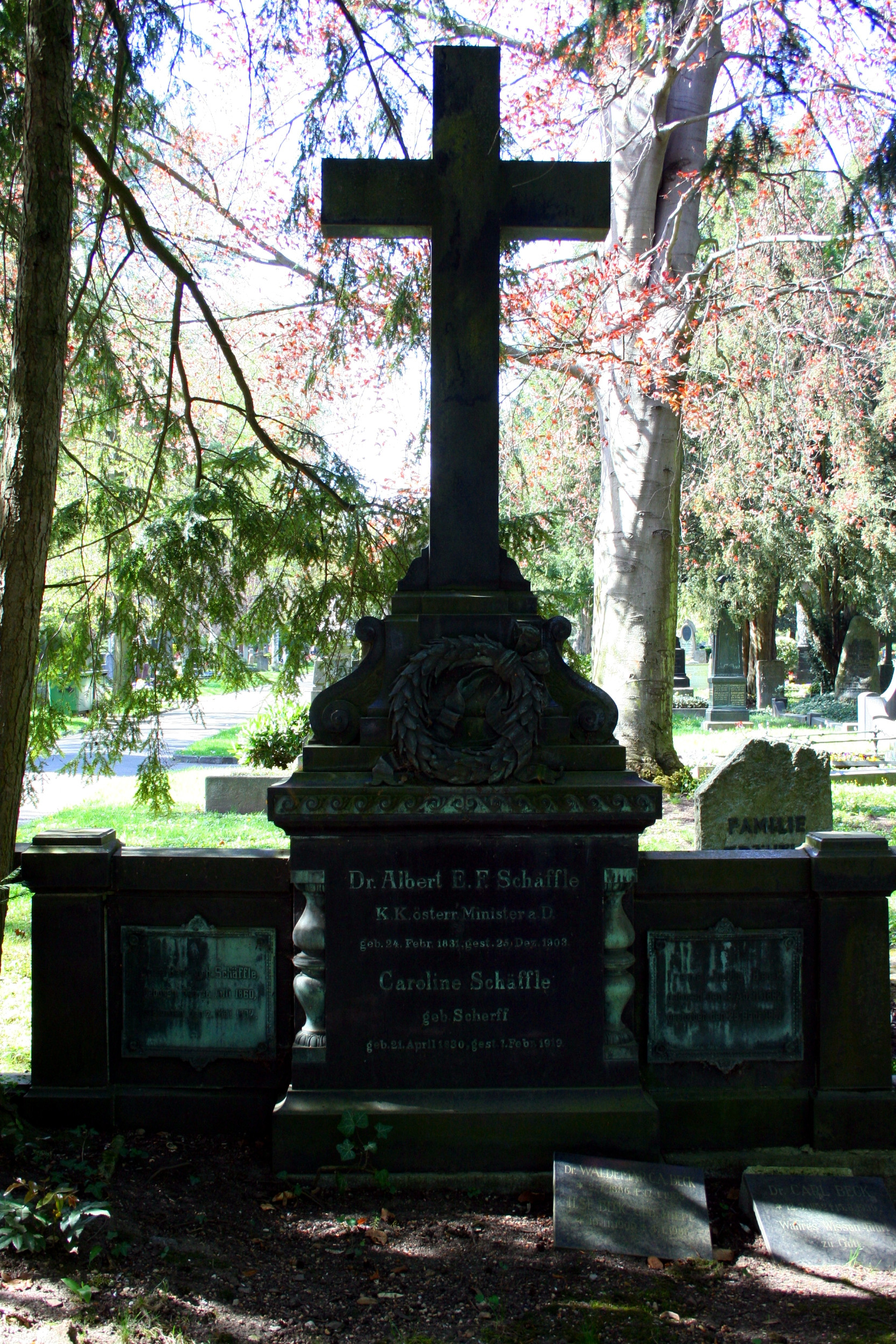 Grab von Albert Schäffle auf dem Pragfriedhof in Stuttgart